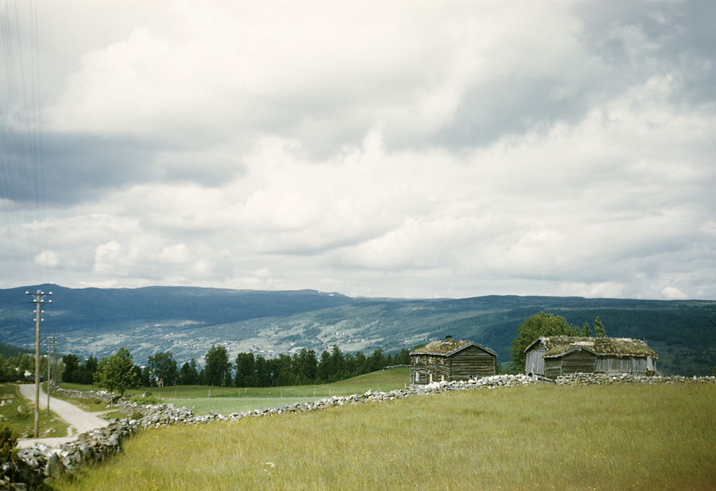 Gauldalen Valley, Sør-Trøndelag, Norway 14.07.1948